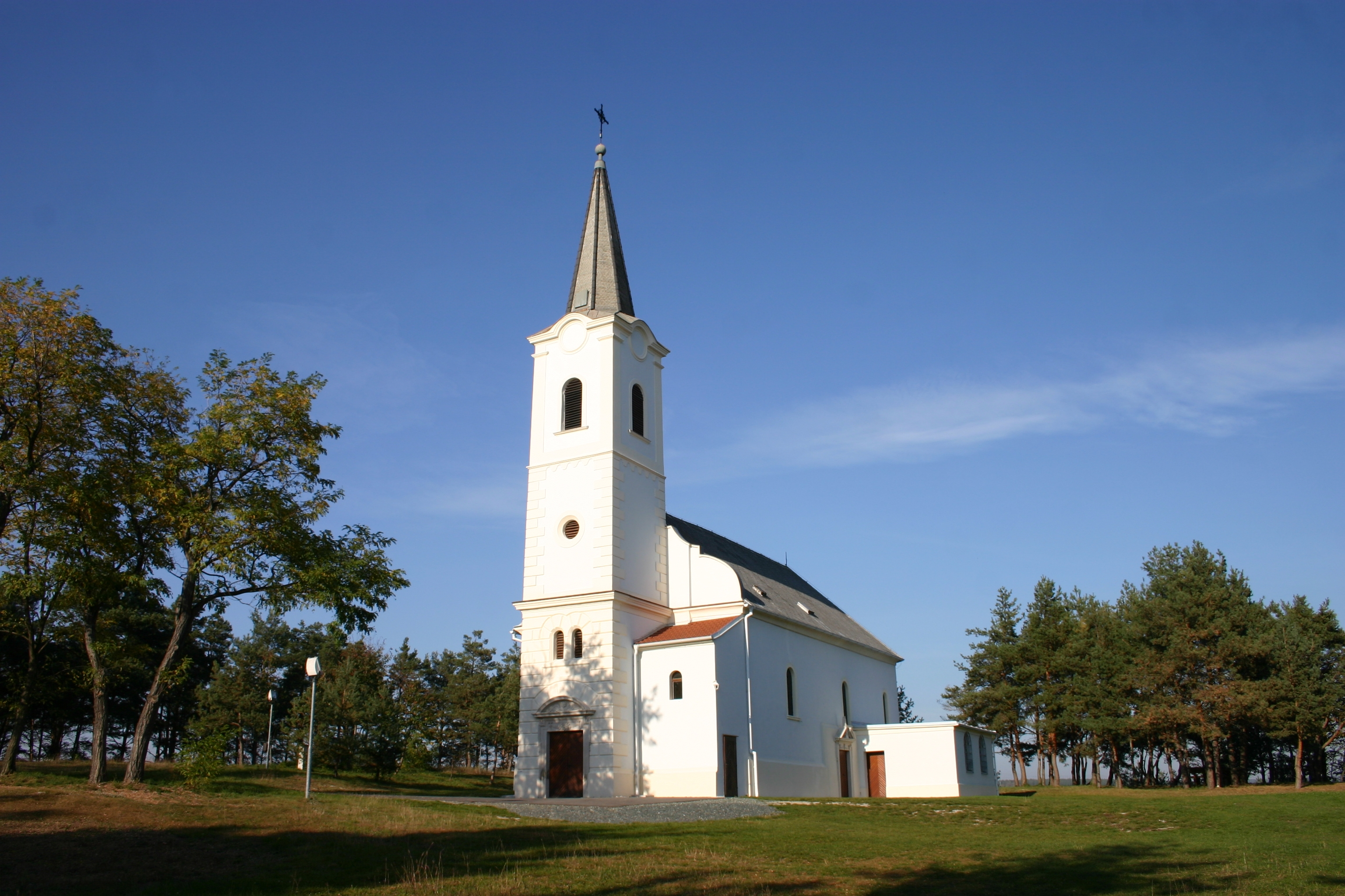 Lackendorf Filialkirche zum Heiligen Rochus